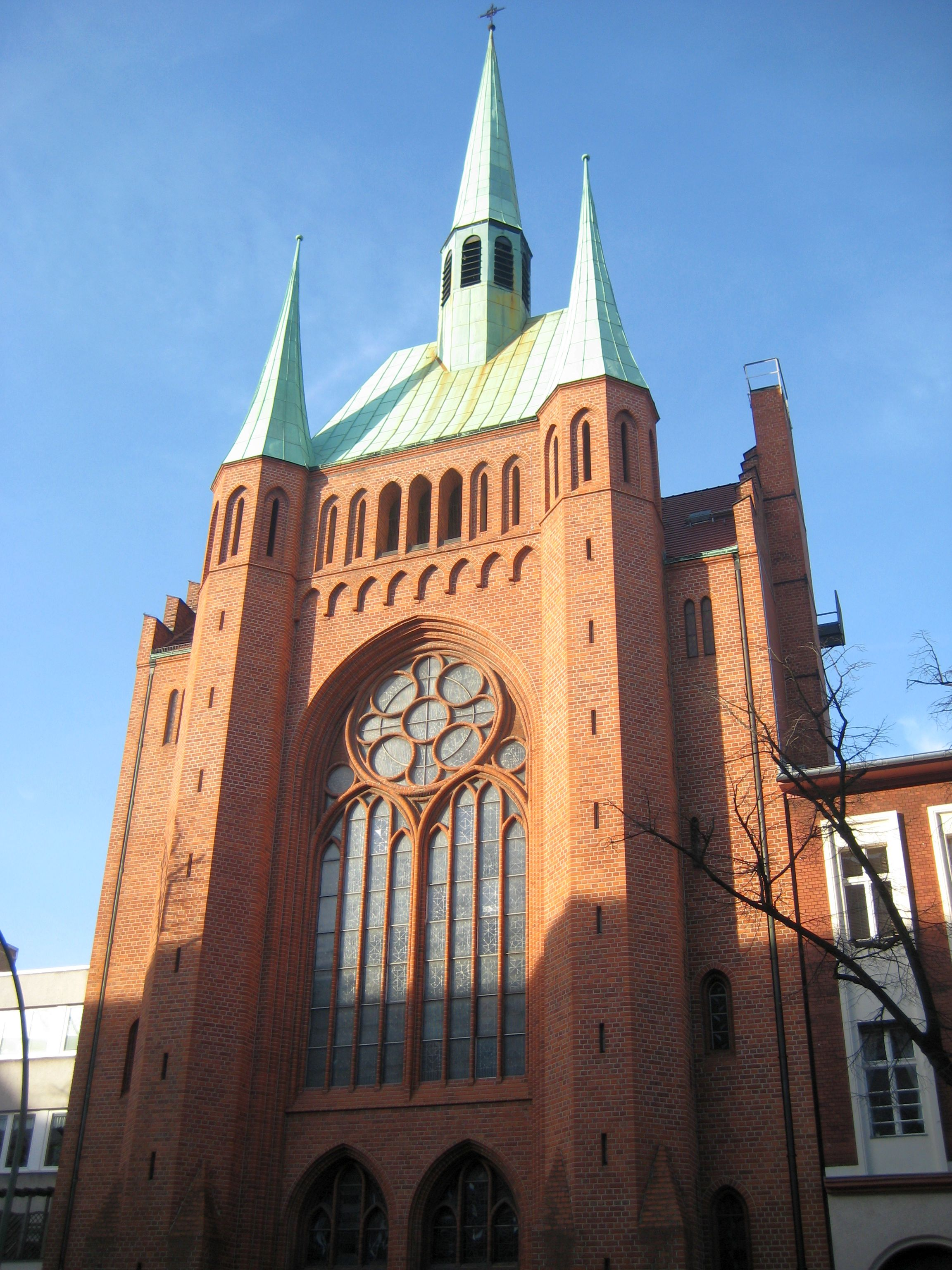 St. Elisabeth-Kirche (Saint Elisabeth Church) at Kolonnenstraße in Berlin-Schöneberg, built in 1911 by architect Bernhard Hertel